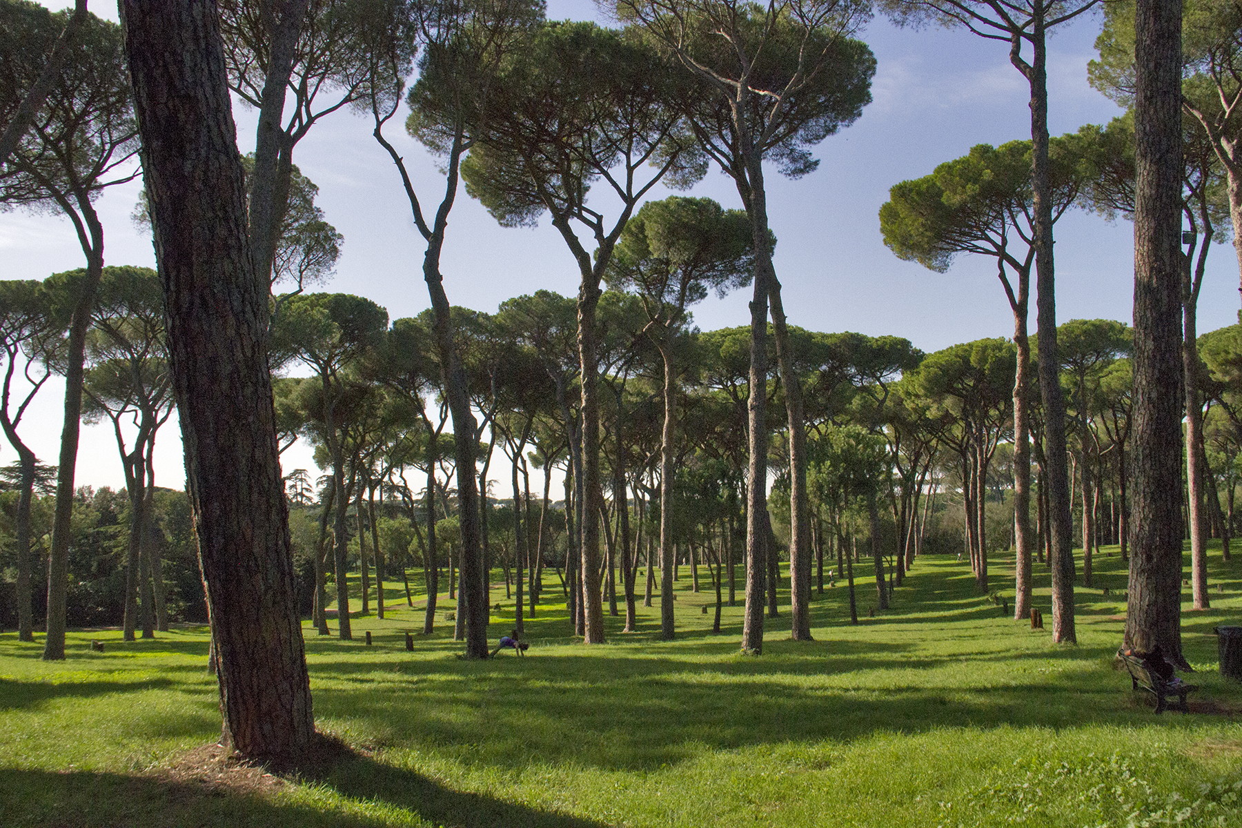 Doria Pamphili 6376